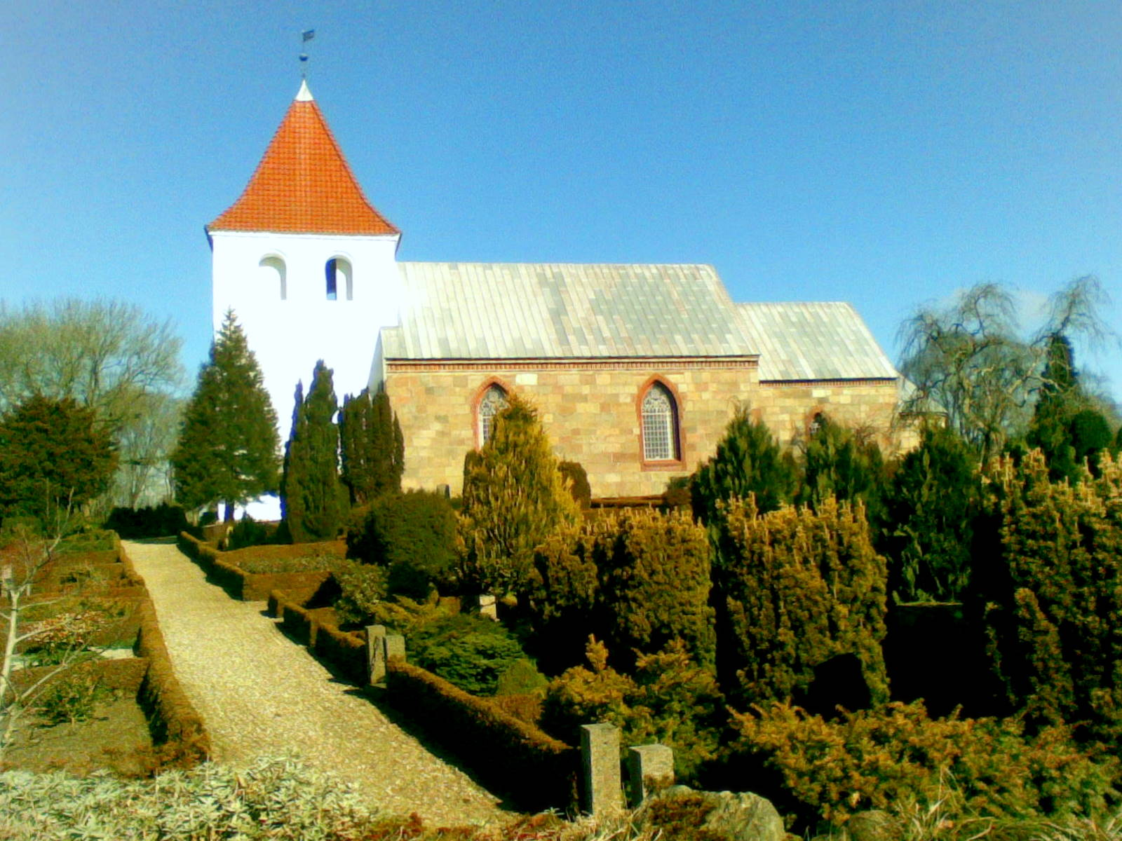 Kattrup kirke (Horsens kommune)